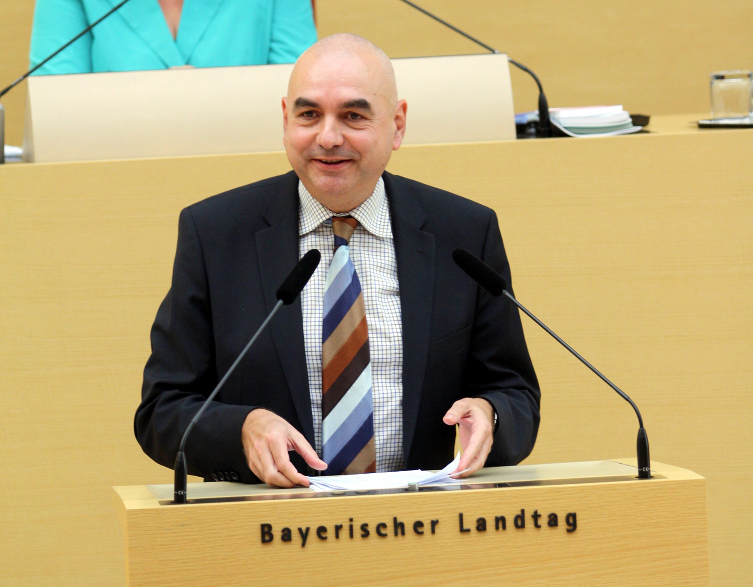 Jürgen Mistol, deutscher Politiker (Bündnis 90/Die Grünen) während einer Rede im Bayerischen Landtag am 4. Dezember 2013